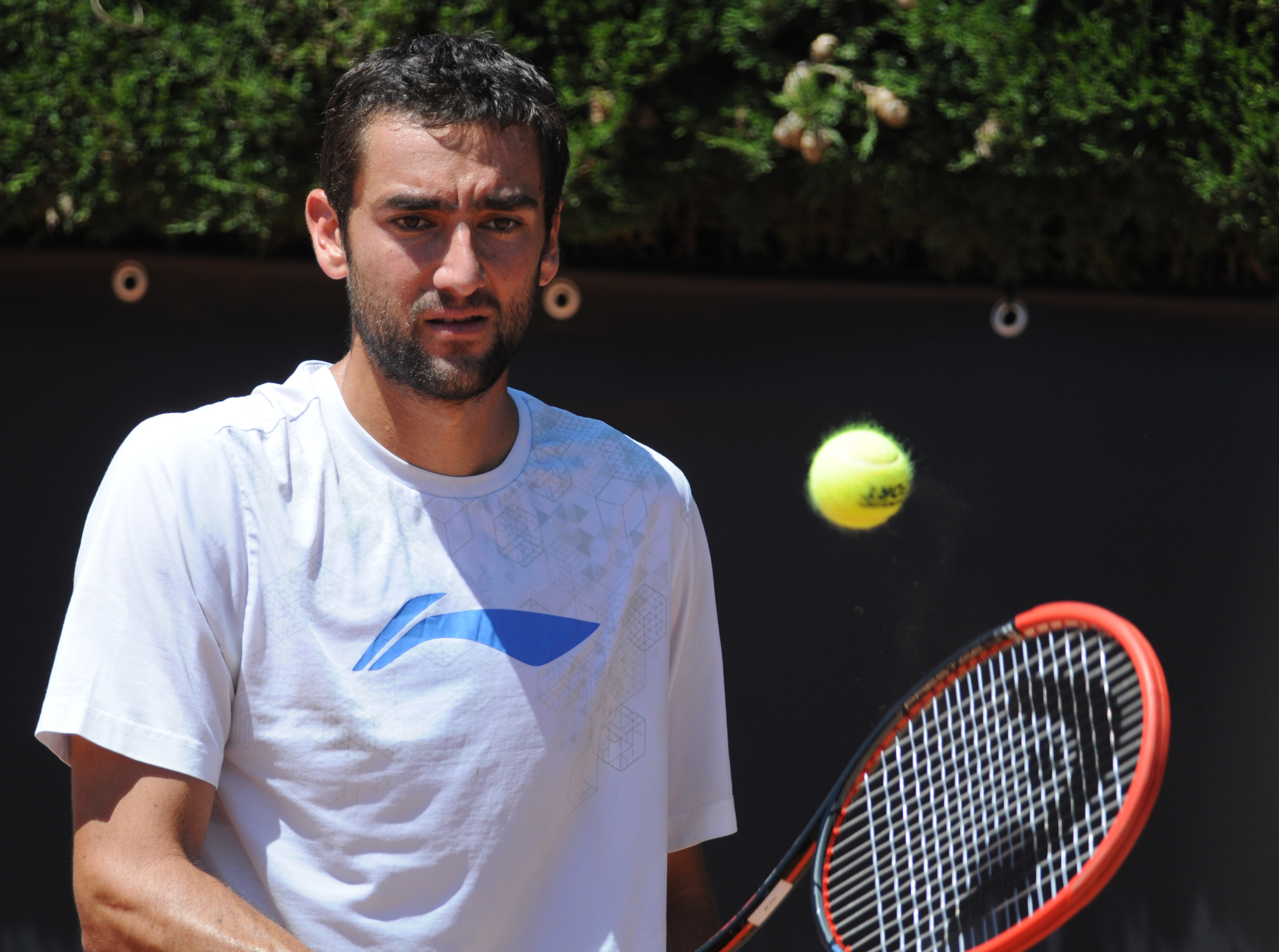 Marin Cilic